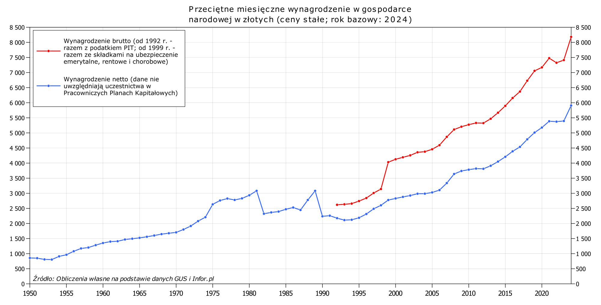 Przeciętne miesięczne realne wynagrodzenie od 1950 roku Wykres na podstawie danych: 1. GUS, "Przeciętne miesięczne wynagrodzenie w gospodarce narodowej w latach 1950-2016" 2. "Roczne wskaźniki cen towarów i usług konsumpcyjnych od 1950 roku", GUS 3. "Kalkulator brutto-netto 2000-2016", Infor.pl